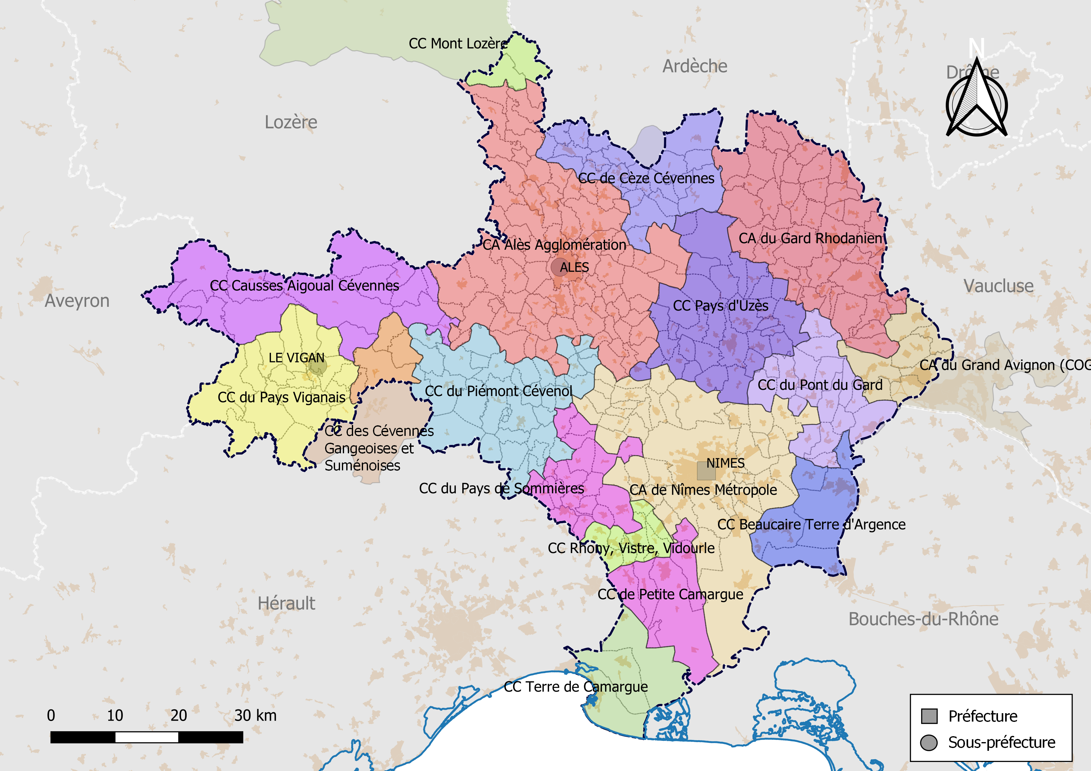 Carte des intercommunalités du département du Gard, France. Composition au 1er janvier 2019.